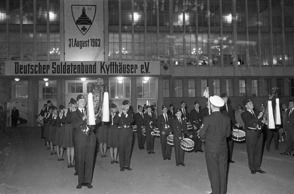 Kameradschaftsabend in der Ostseehalle.